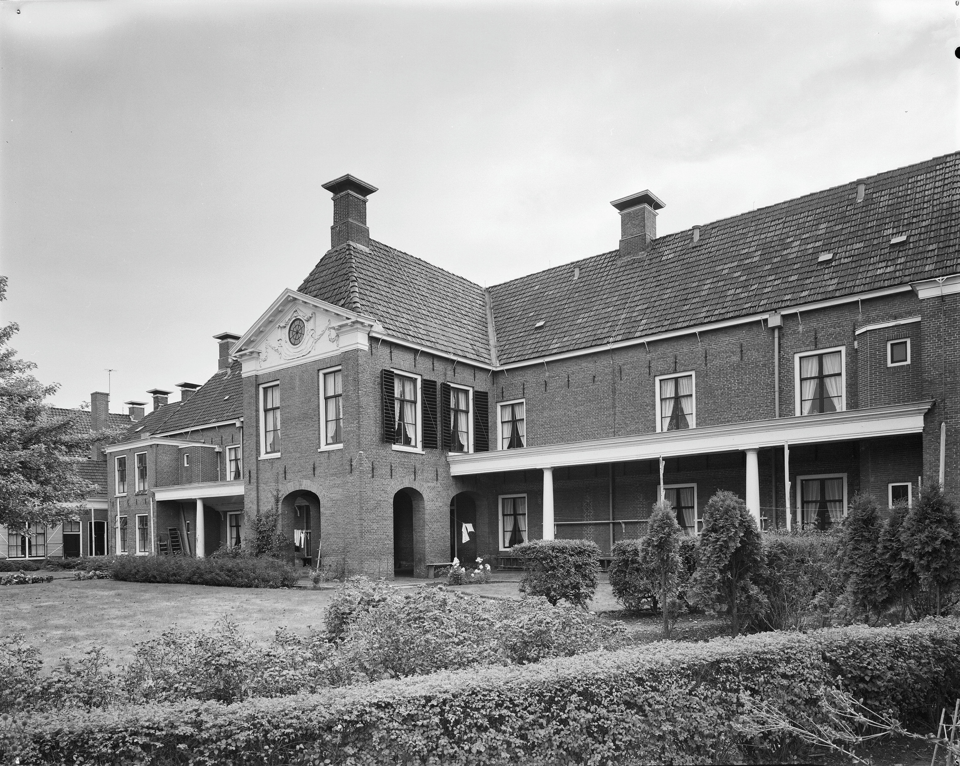 St.Anthonius Gasthuis: achtergevel